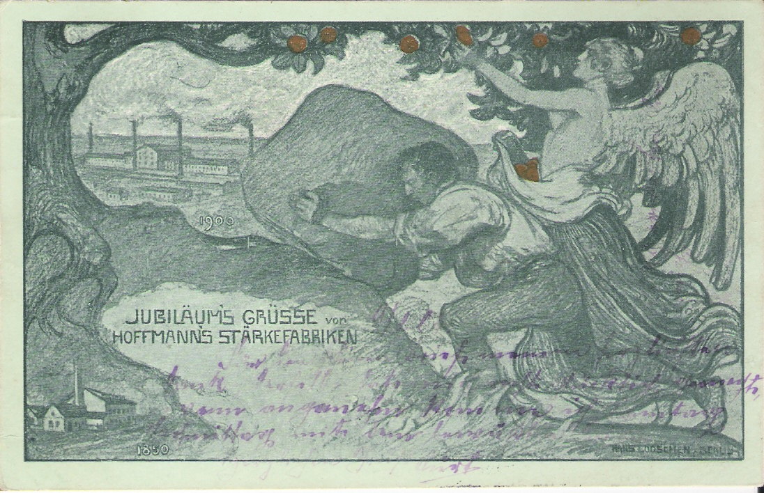 Postkarte zum 50jährigen Firmenjubiläum